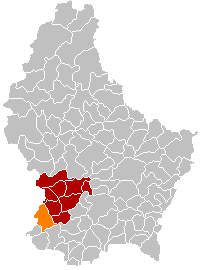 Localisatioun vun der Gemeng Käerjeng